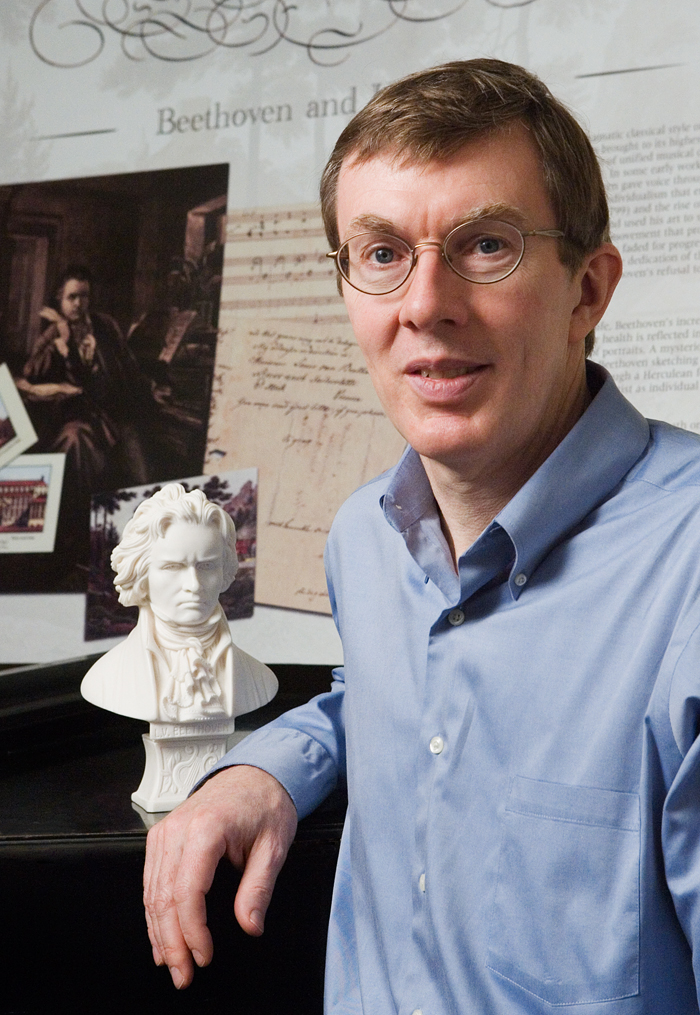 Fotografie